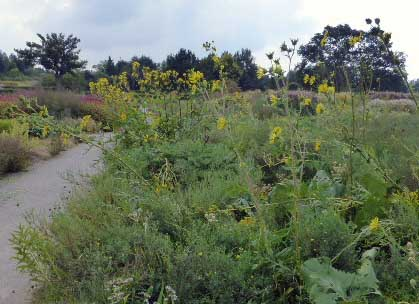 Gartenanlage von Tom Stuart-Smith um das Bicentenary Glasshouse in RHS Wisley